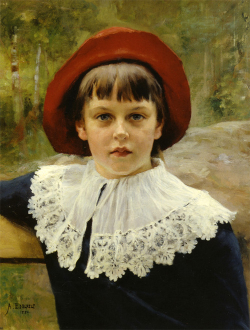 Berta Edelfelt. Porträtt av brodern Albert Edelfelt 1884. Olja på duk. 60x45cm.